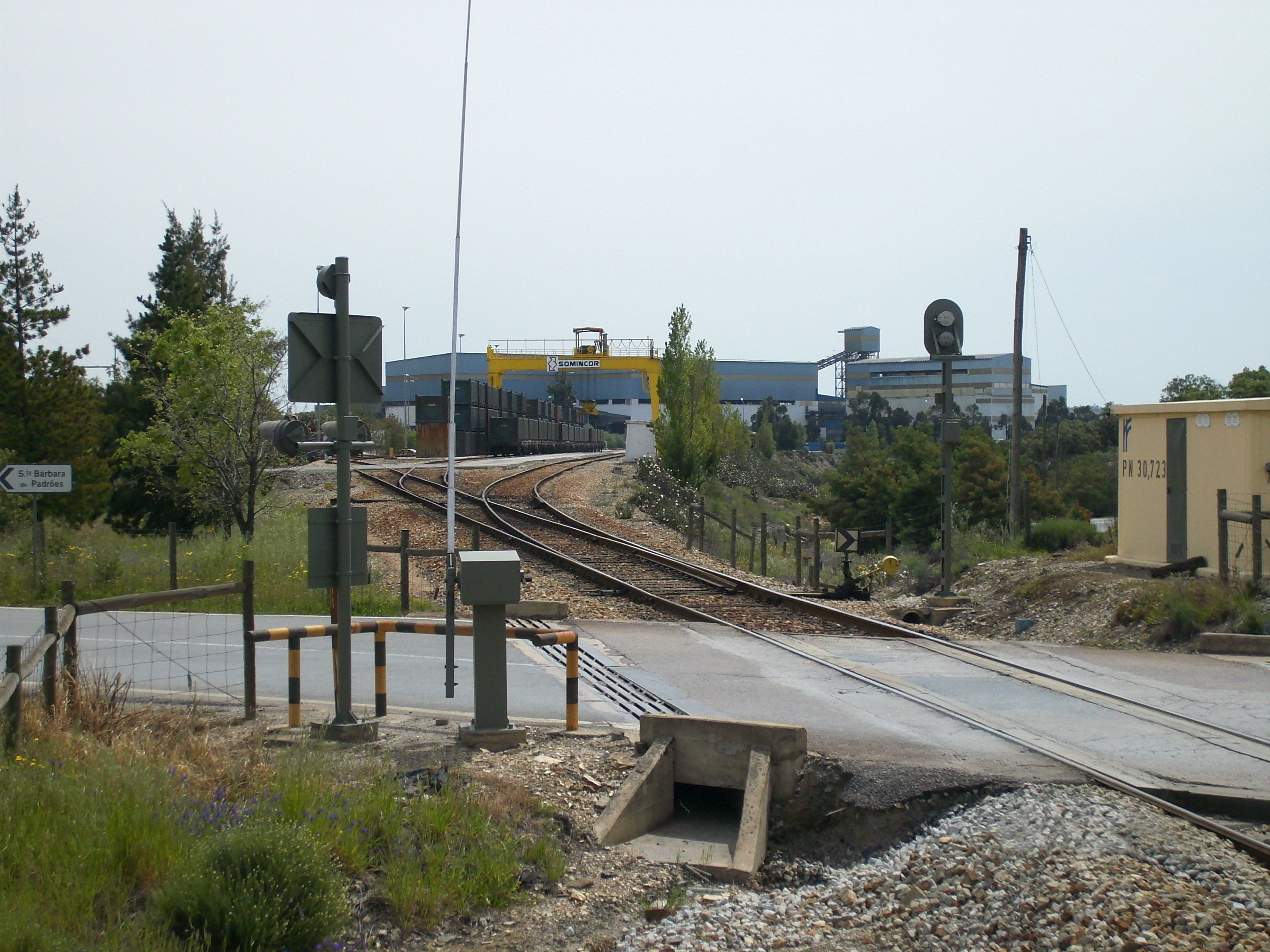 Anschlussgleis zur Mina de Neves Corvo.